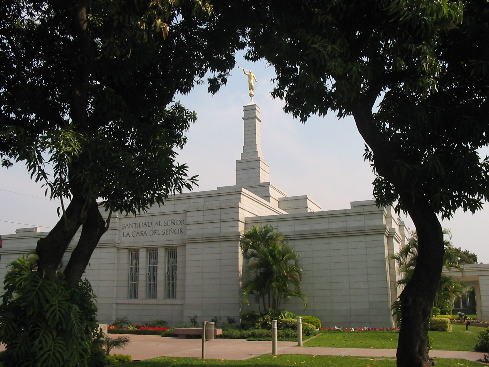 Asunción Paraguay Temple